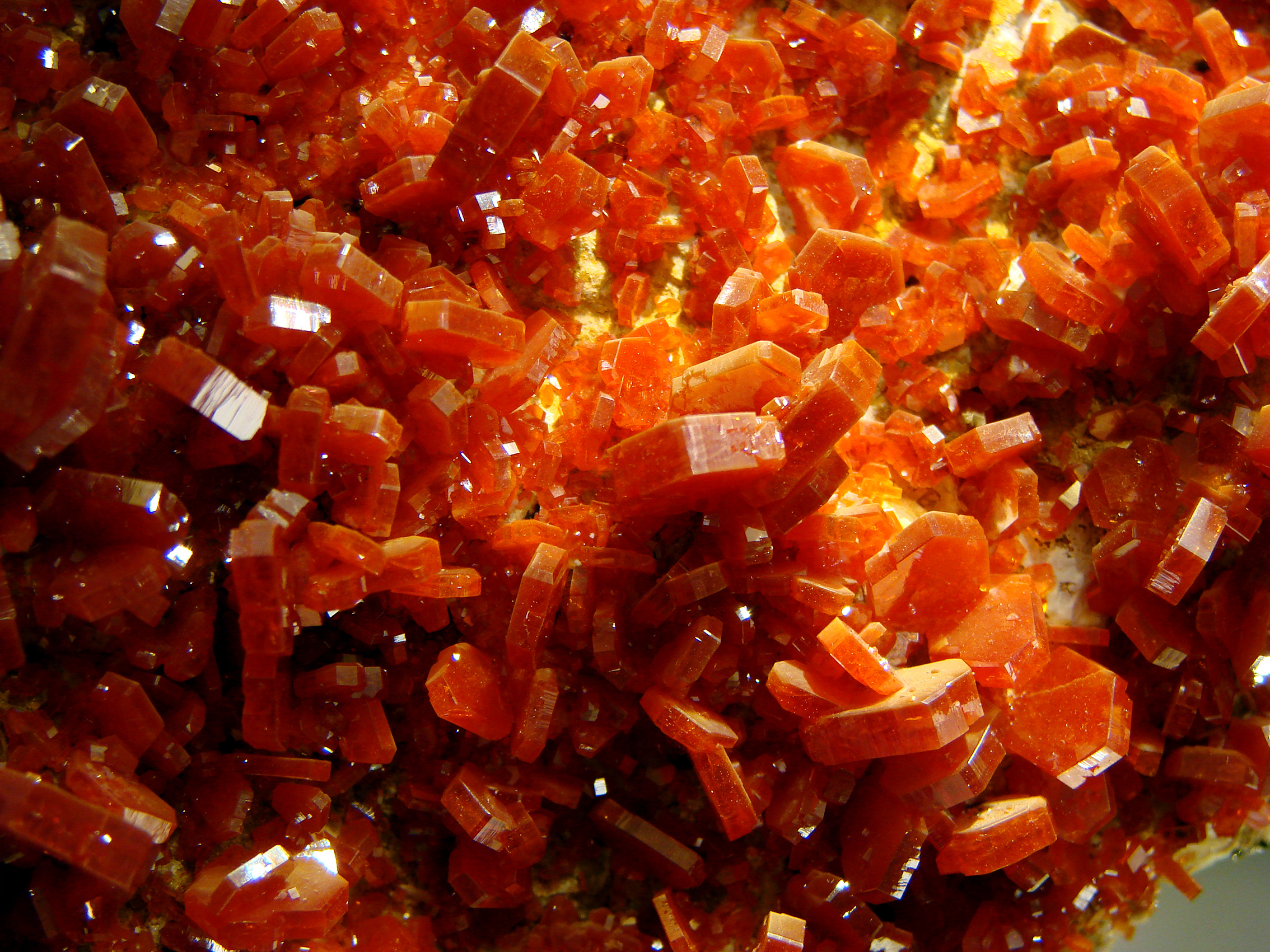 Vanadinite. Provenance: Maroc.